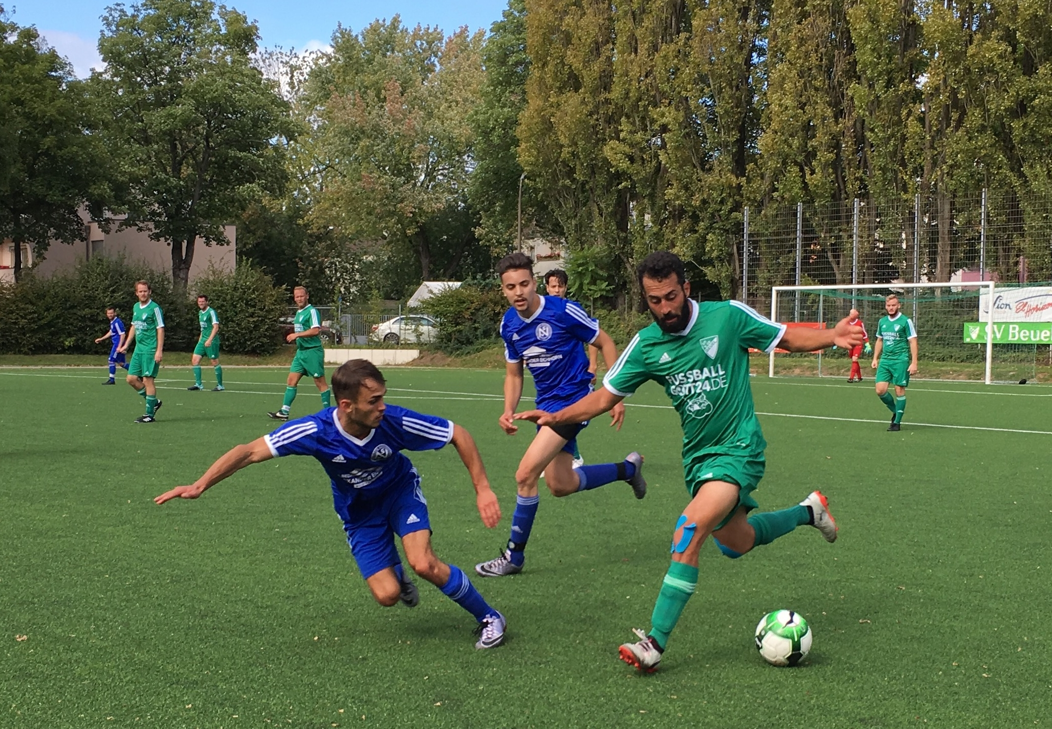 Bonn-Beuel, Kunstrasenplatz am Fritz-Elbern-Stadion: Ligaspiel der Fußball-Kreisklasse A Bonn: SV Beuel 06 gegen SV Heimerzheim.